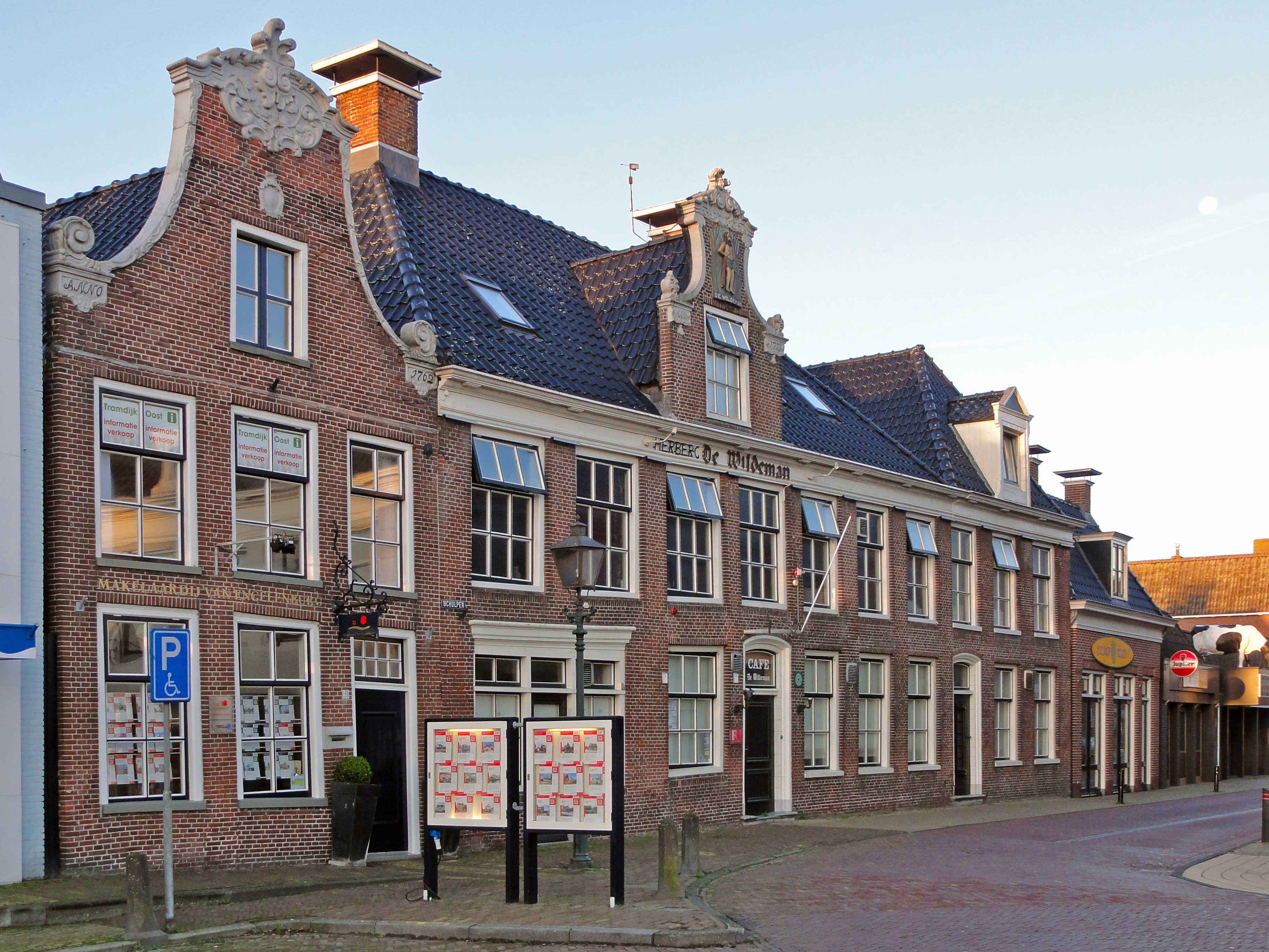 De Schulpen 6 in Lemmer